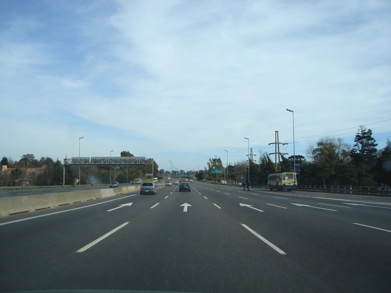 Calzada principal de la Autopista Pascual Palazzo, integrante de la Ruta Nacional 9 hasta su bifurcación con la Ruta Nacional 8, a metros de su intersección con la Avenida Bernabé Márquez, San Isidro, Provincia de Buenos Aires, República Argentina. La autopista es parte de una de las ramas de la Carretera Panamericana.